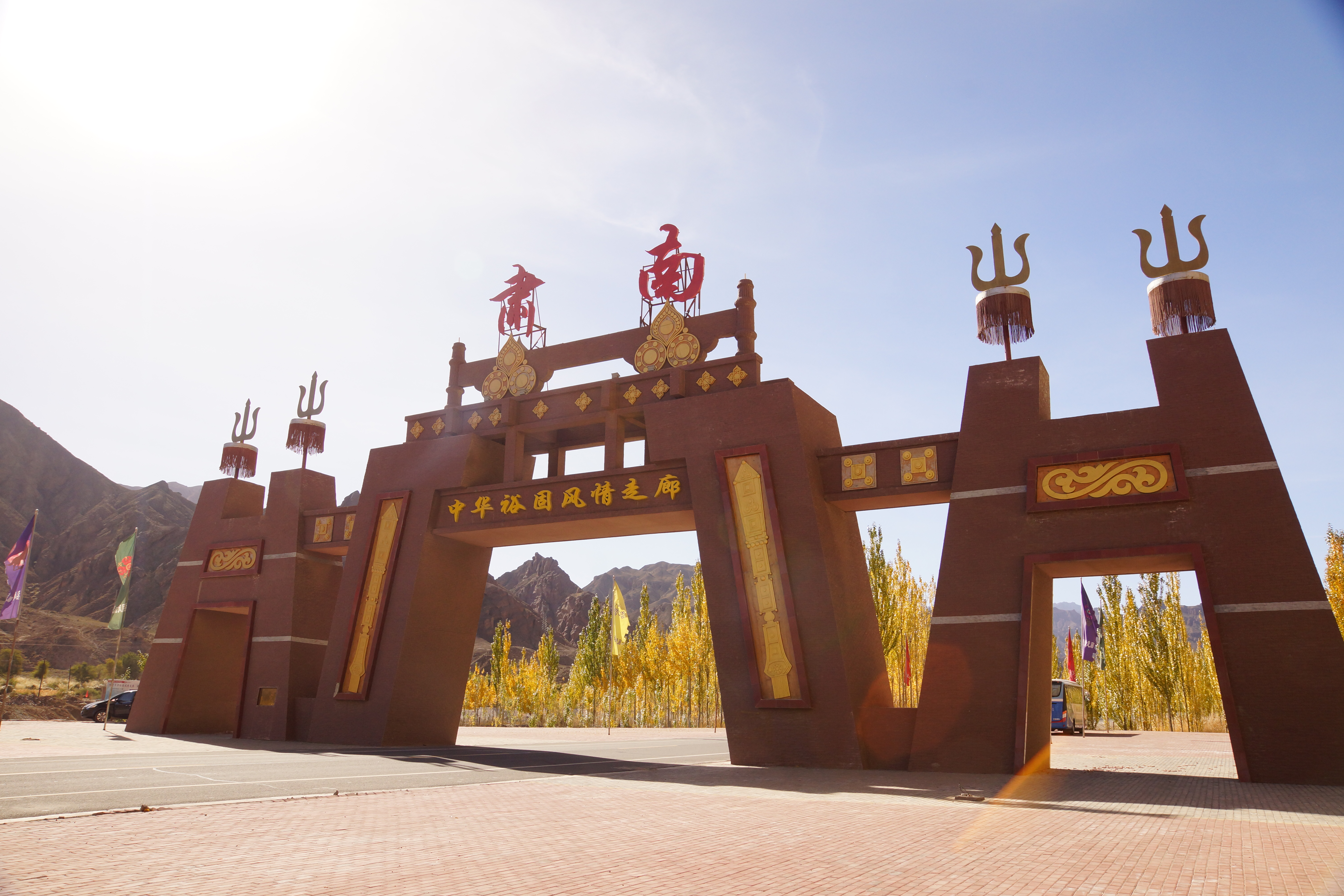 肃南 - 中华裕固 风情走廊 / Sunan - Chinese Yugur Scenic Corridor